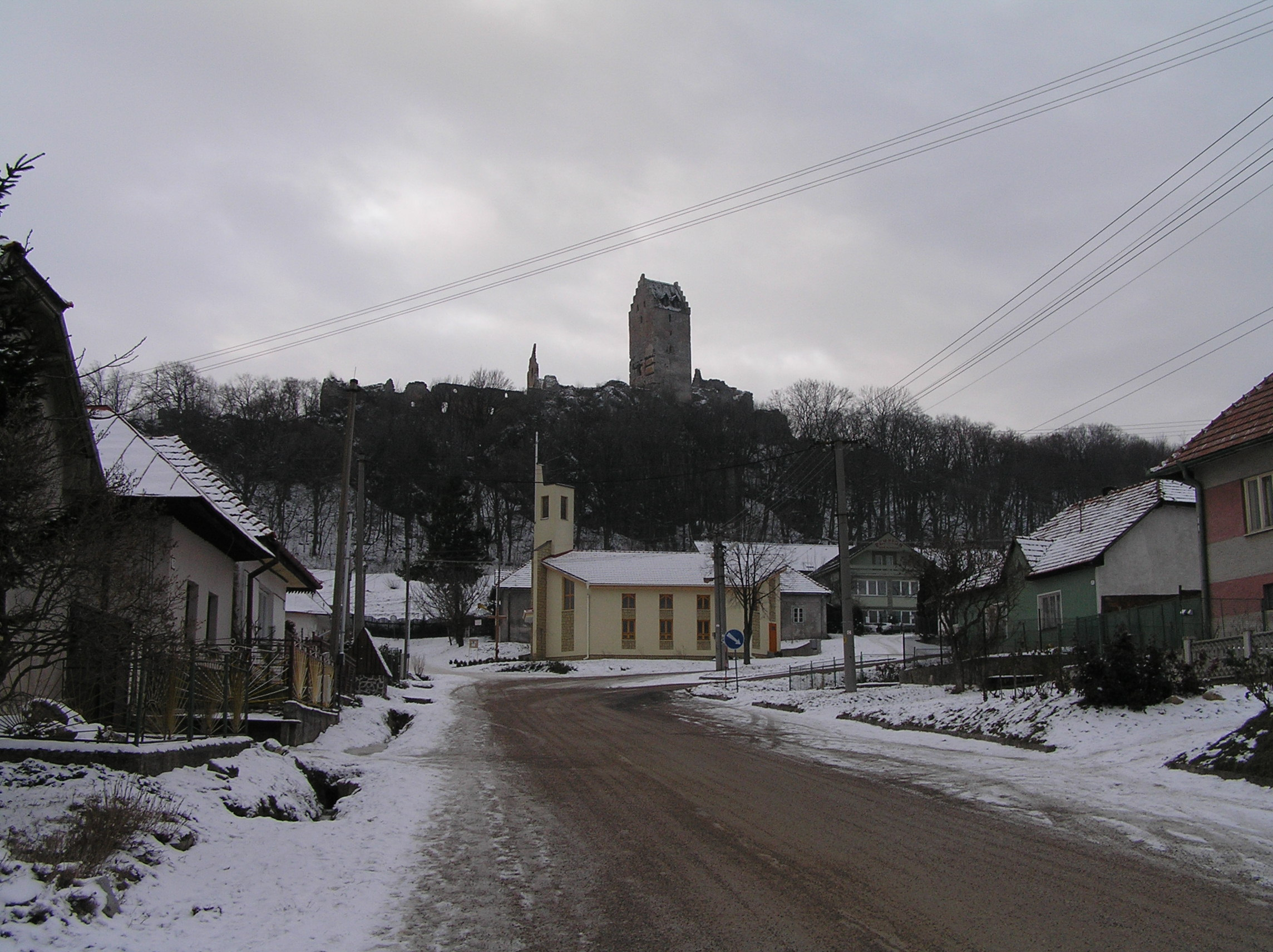 obec Podhradie